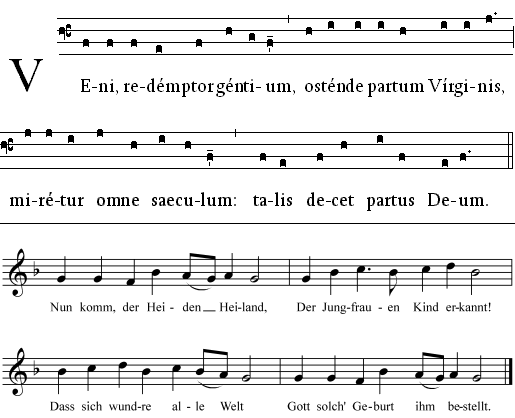 A Veni redemptor gentium himnusz és a Nun komm, der Heiden Heiland korál összehasonlítása